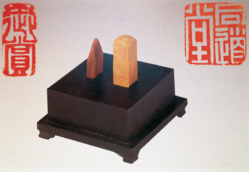 2 con dấu "Ngự Thưởng" và "Đồng Đạo Đường"